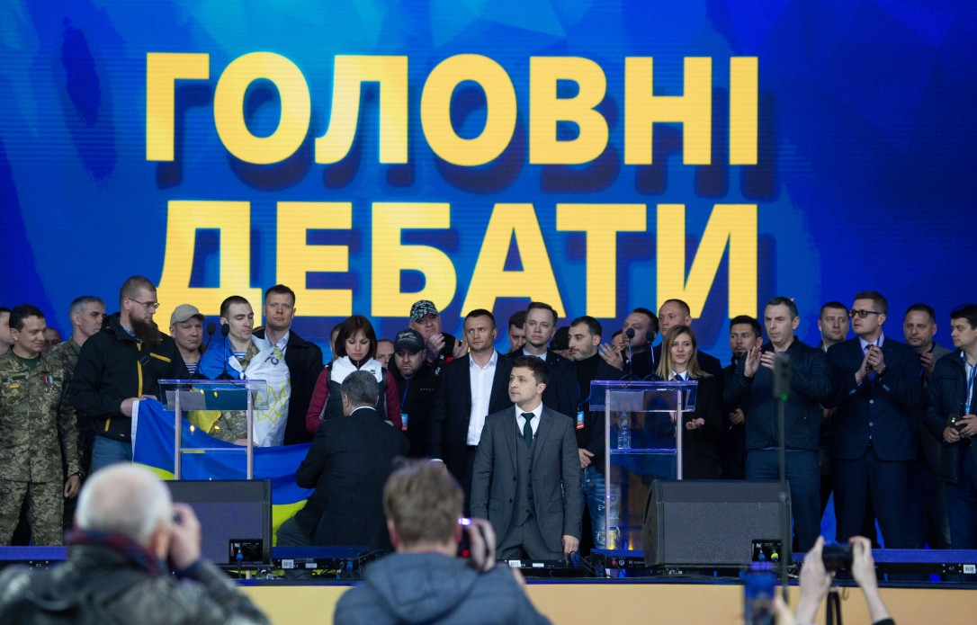 Дебаты кандидатов на пост Президента Украины Петра Порошенко и Владимира Зеленского